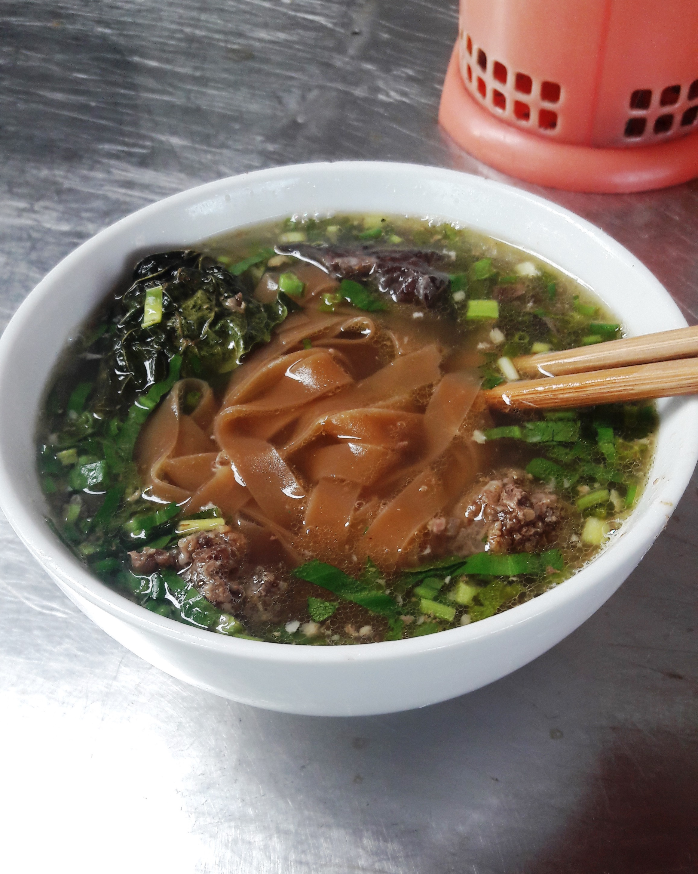 Cuisine of Vietnam